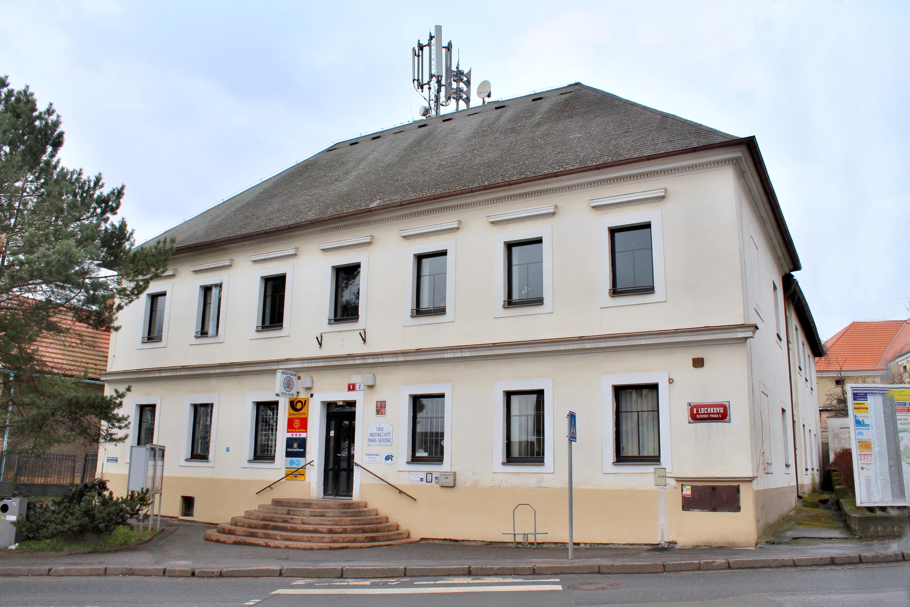 Praha 5-Slivenec